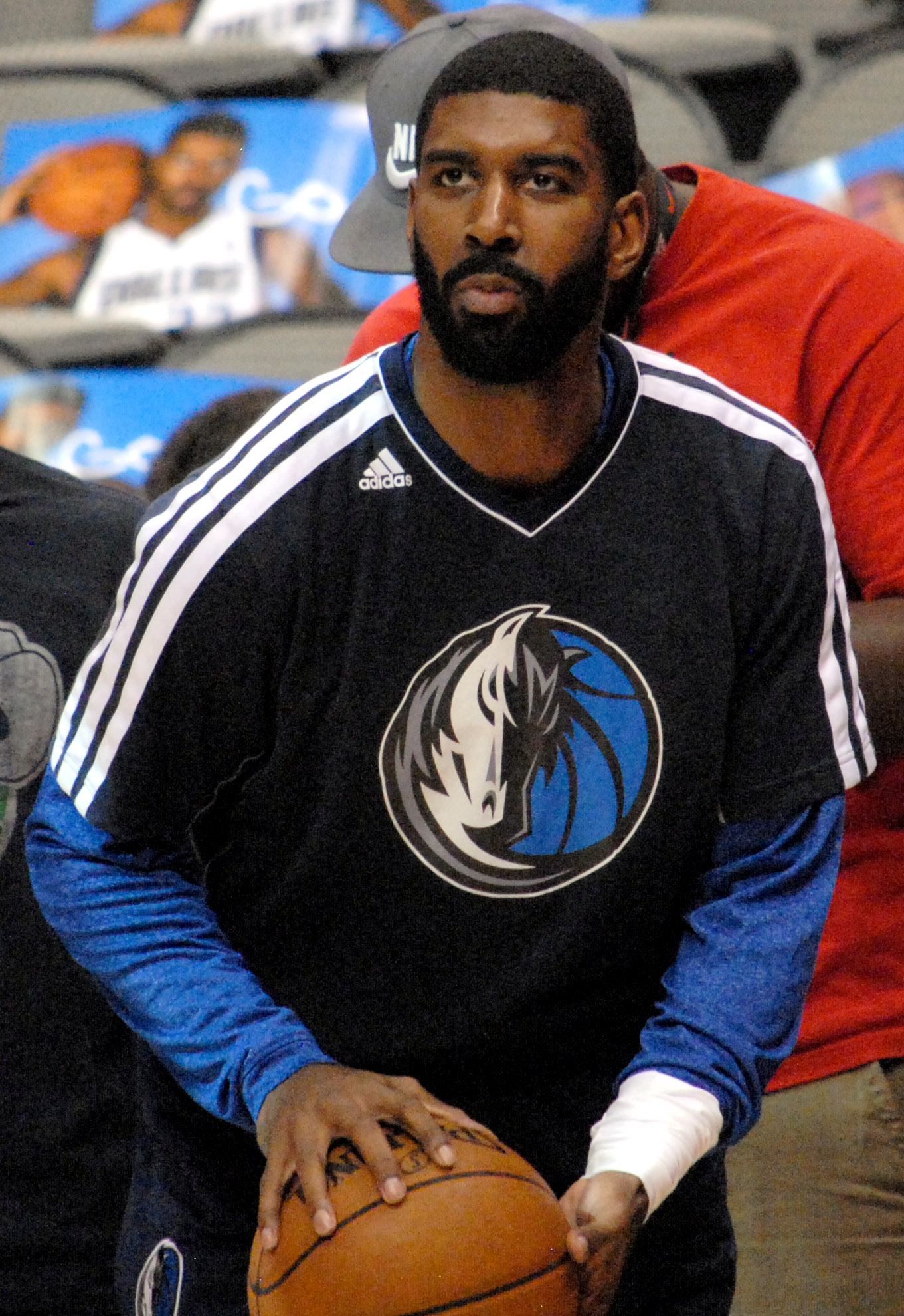 basketball,nba,2/24/2013